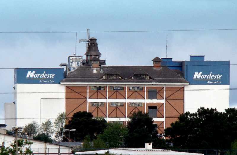 Moinho Nordeste, localizado na cidade de Pinhais (Grande Curitiba), PR, Sul do Brasil.